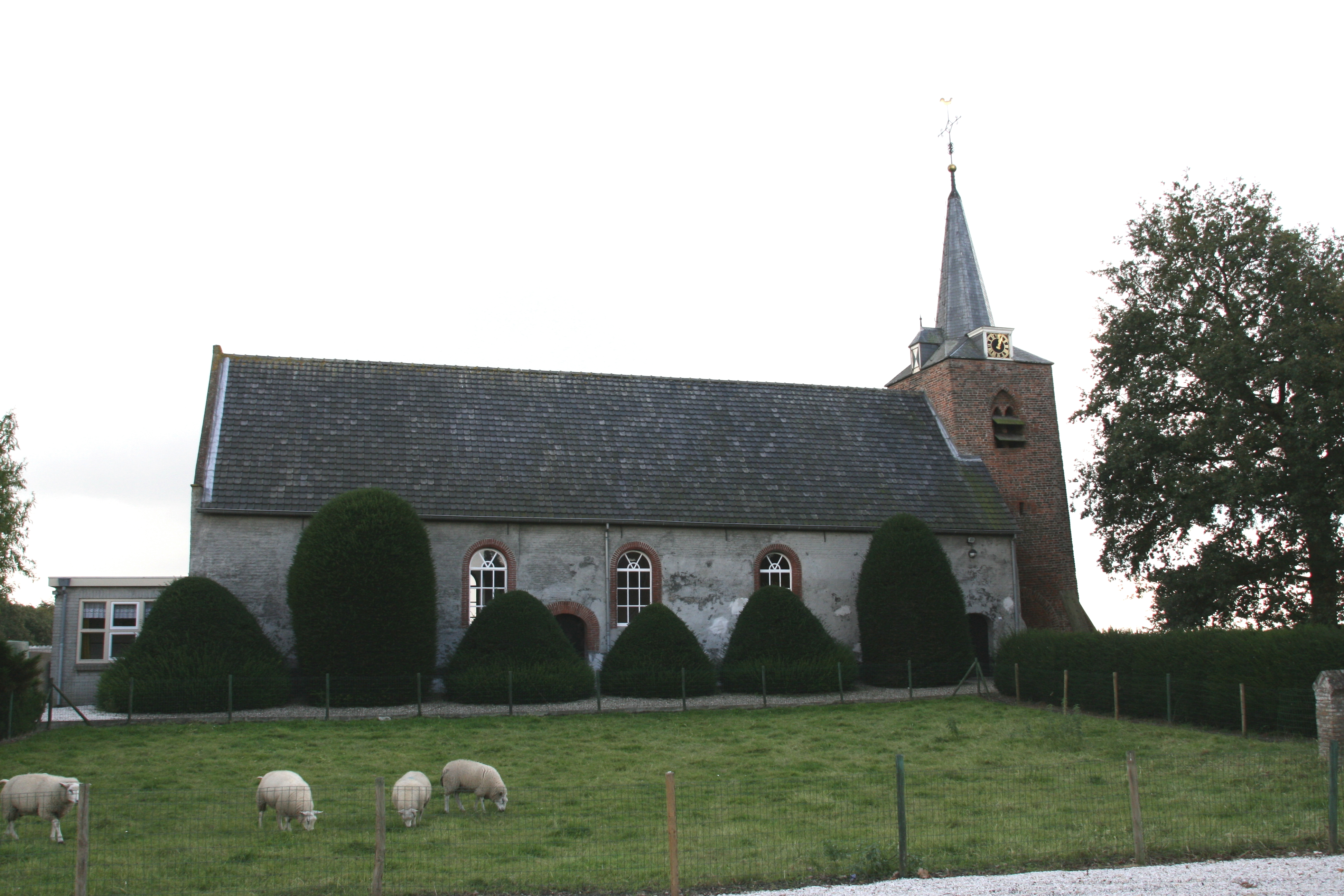 Heesbeen Grotestraat 29 - Ned. Herv. kerk. Tegenwoordig Hersteld Hervormde Kerk